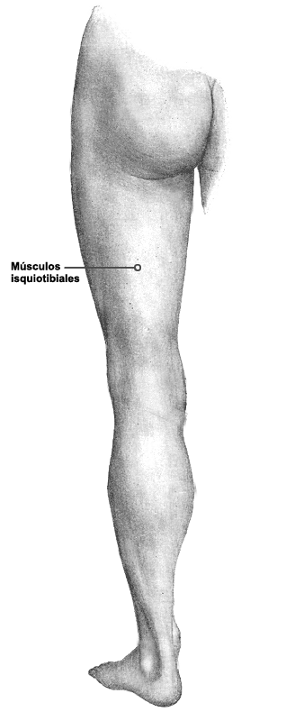 Músculos isquiotibiales, ilustración 1239 del libro Anatomía del cuerpo humano de Henry Gray.